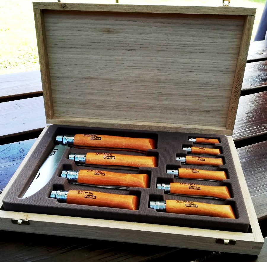 Game actuelle complète en coffret du numéro 2 au numéro 12.